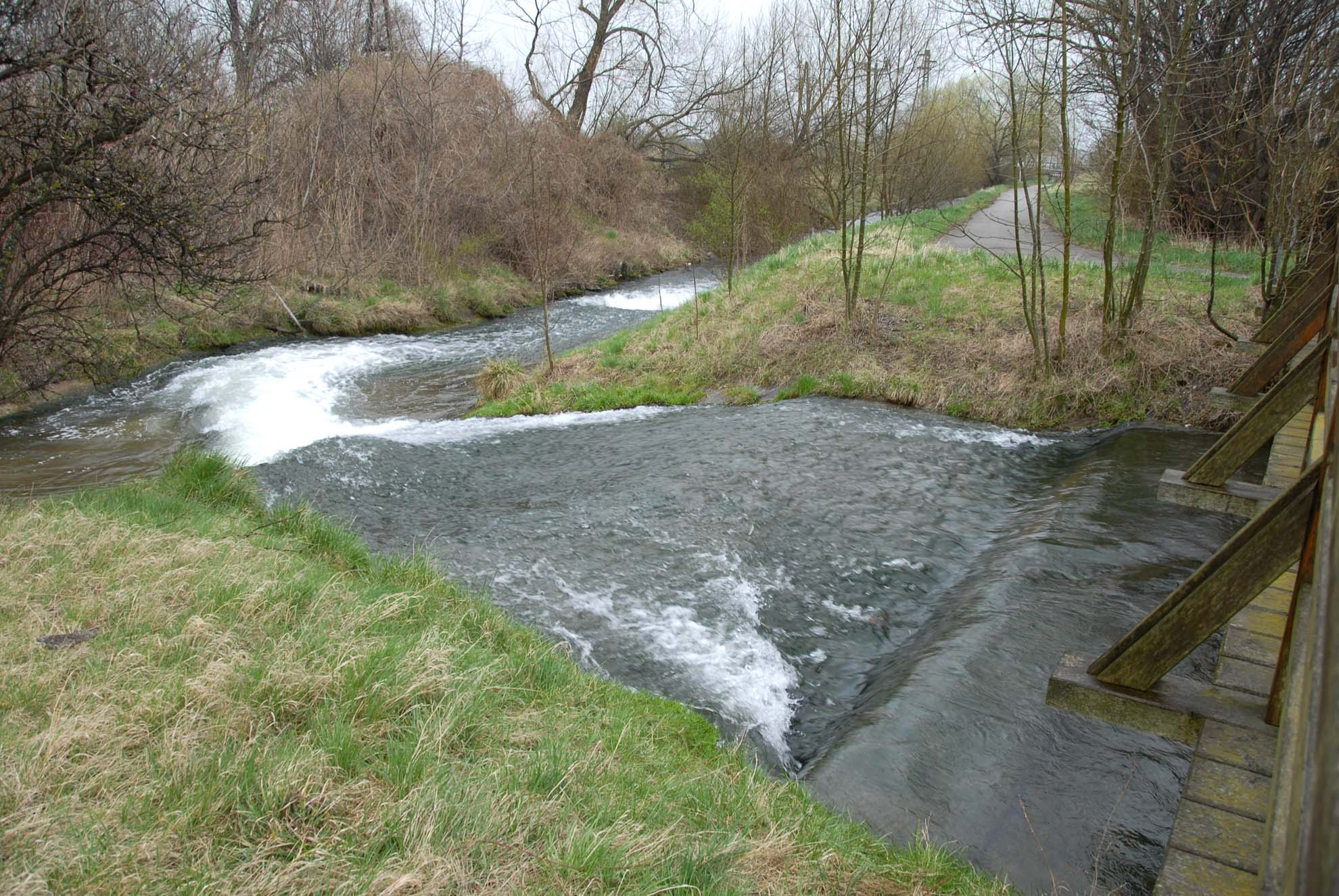 Das Ende des Wiener Neustädter Kanals nahe der Bahnstation Biedermannsdorf - Laxenburg. Der Kanal mündet hier in den Mödlingbach. Aufnahme: Motox 23.03.07